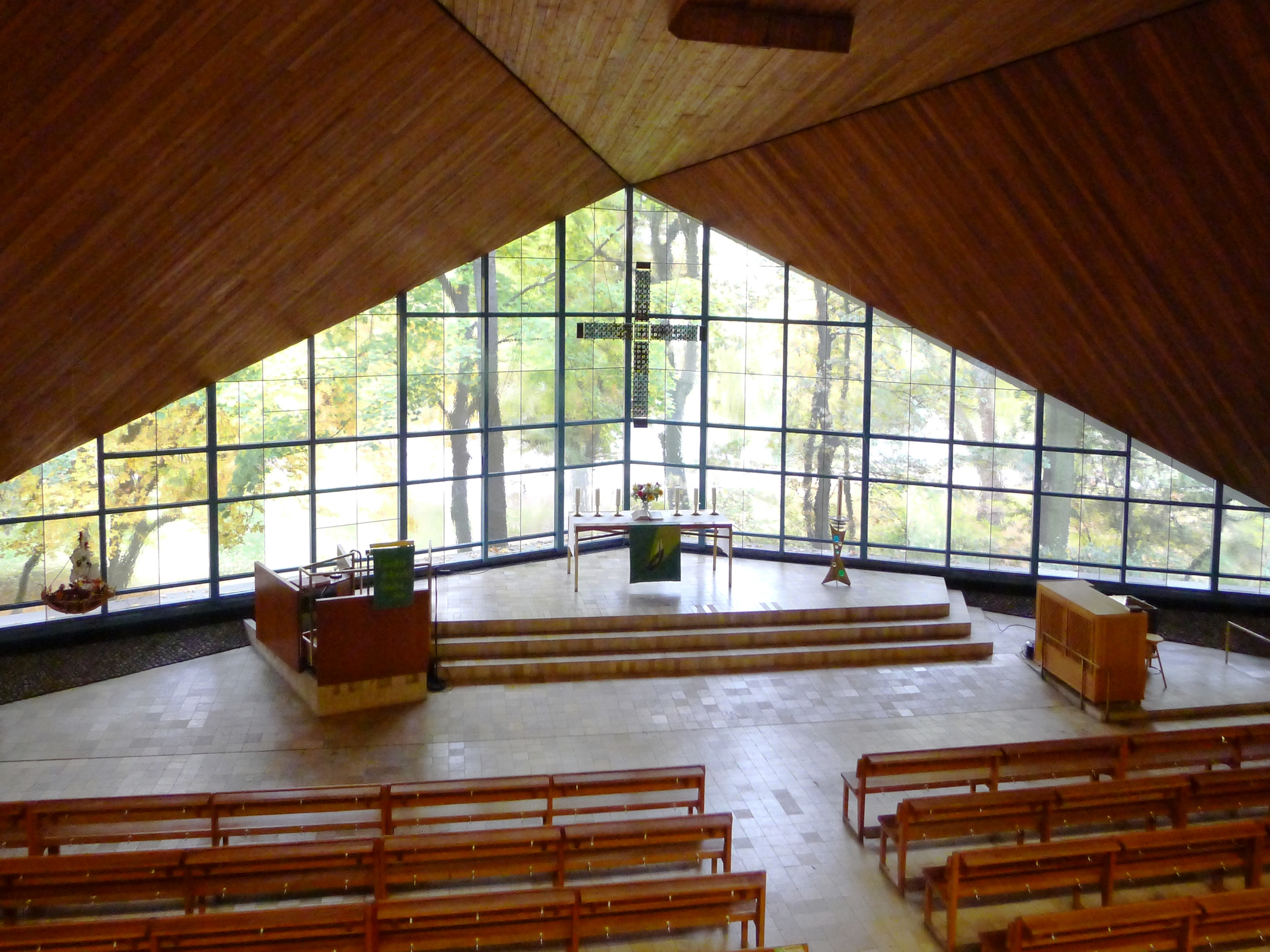 Blick in den Kirchraum Richtung Altarfenster